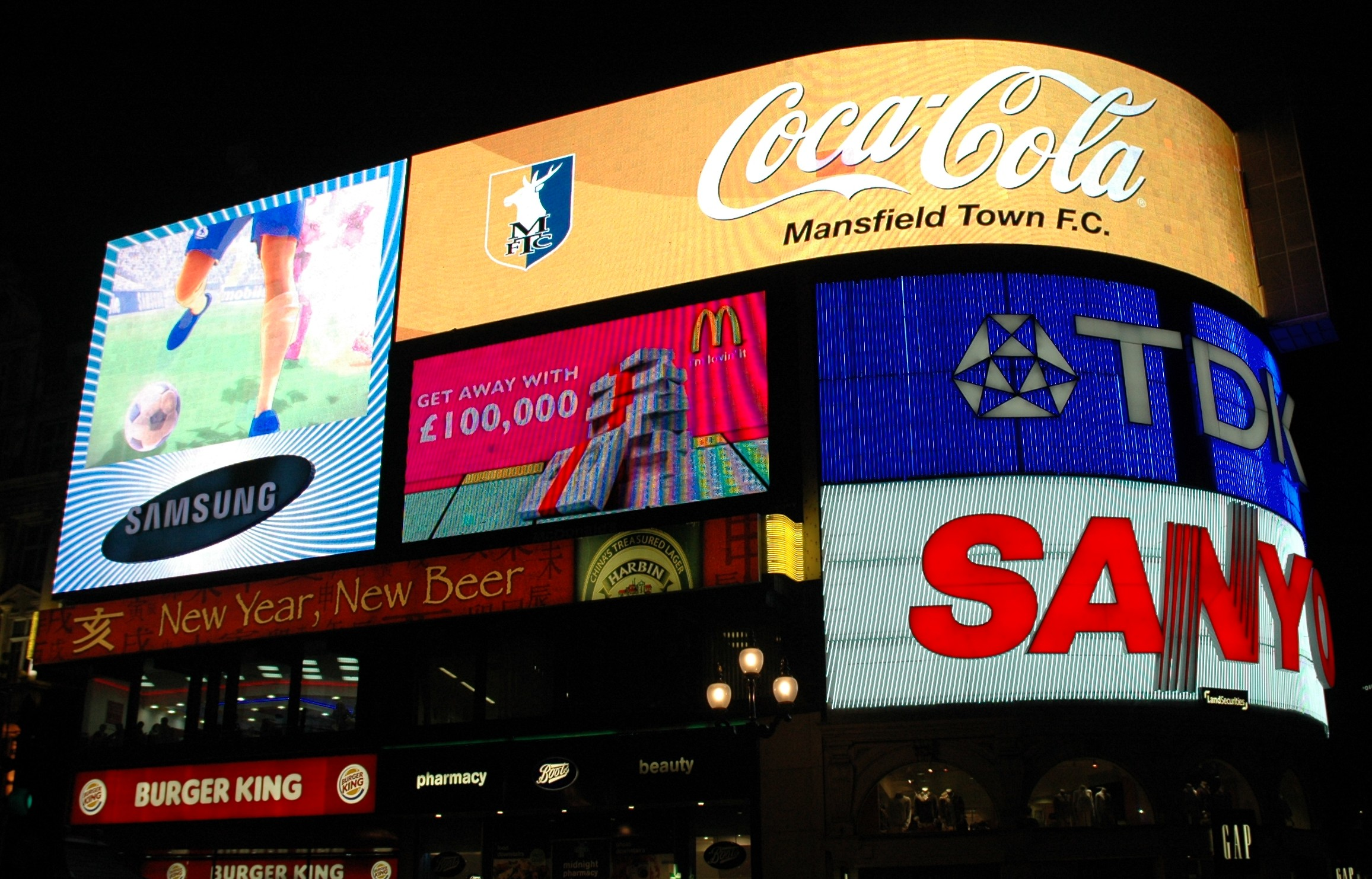 Londres - Piccadilly Circus de nit